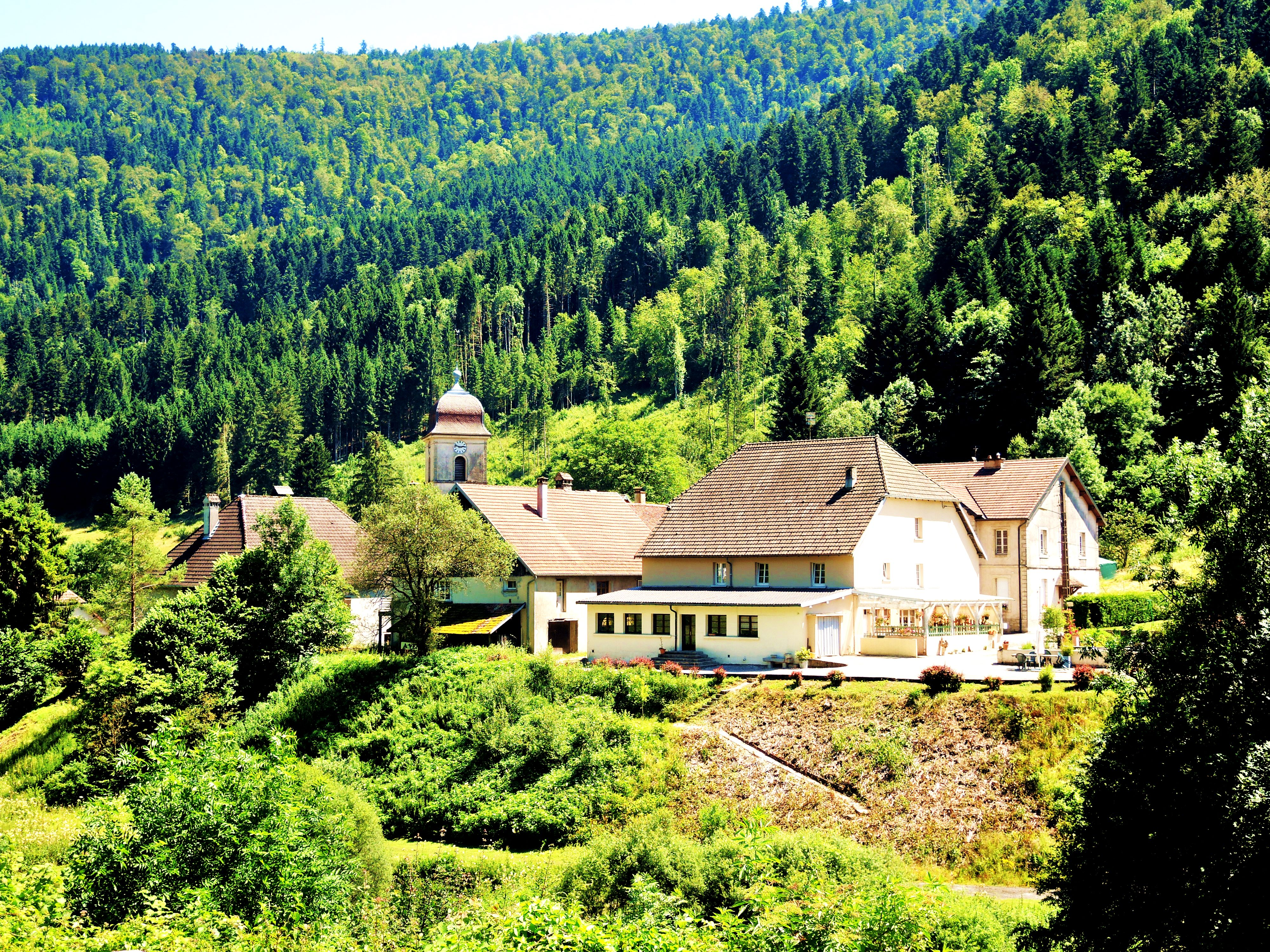 Panorama sur le village.